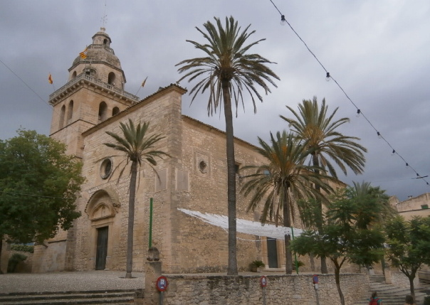 Kirche von Montuiri